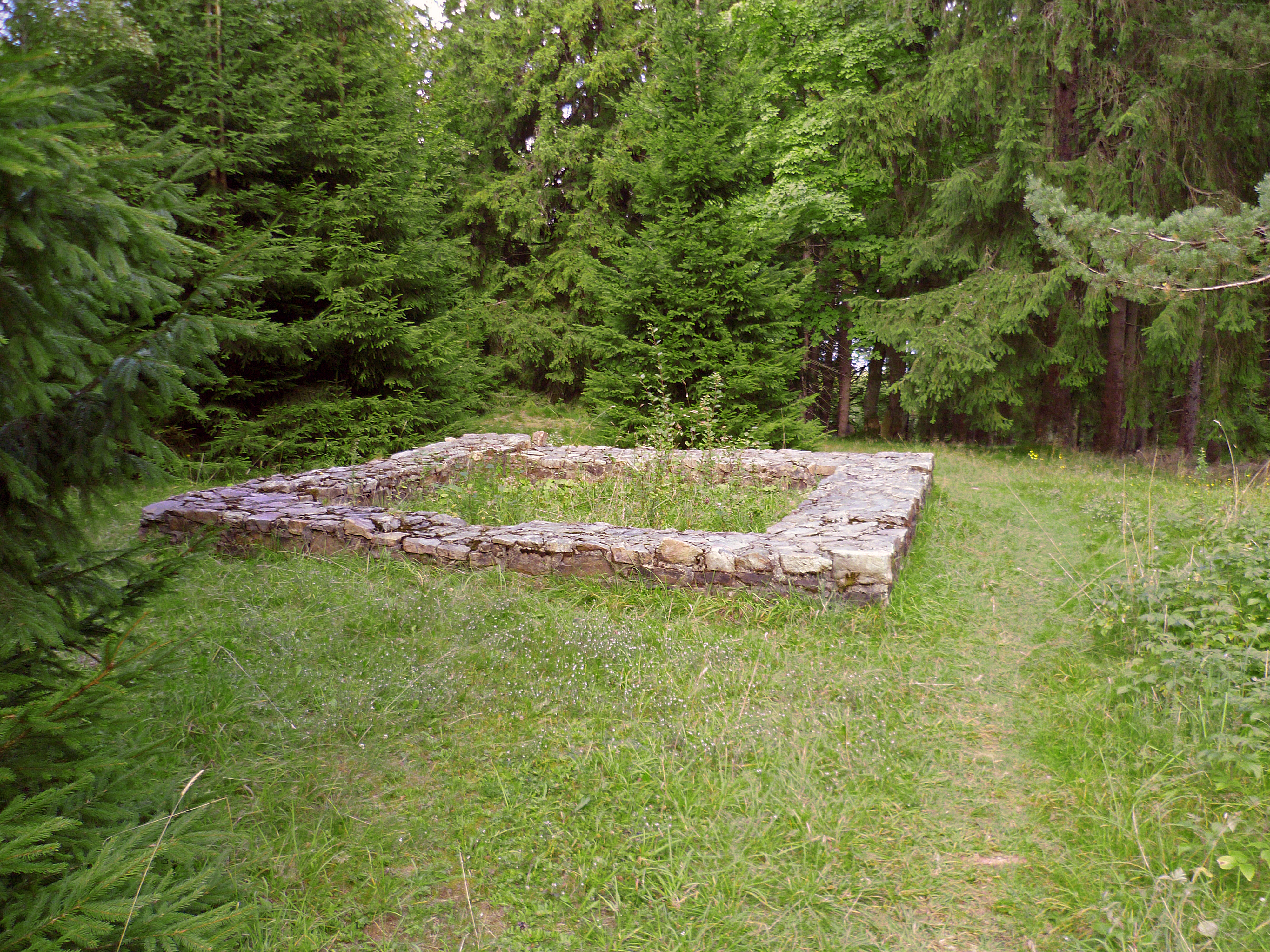 Rekonstruierte Fundamente des WP 3/55 am Limes